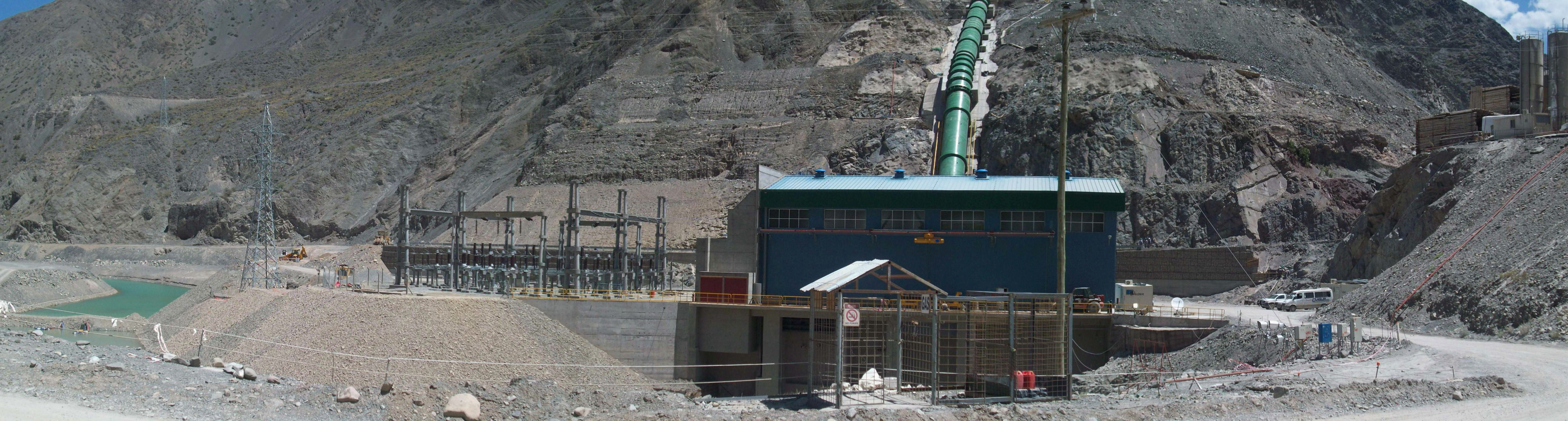 Central Hidroeléctrica Los Caracoles sobre el Río San Juan, en el departamento Zonda, provincia de San Juan, Argentina.